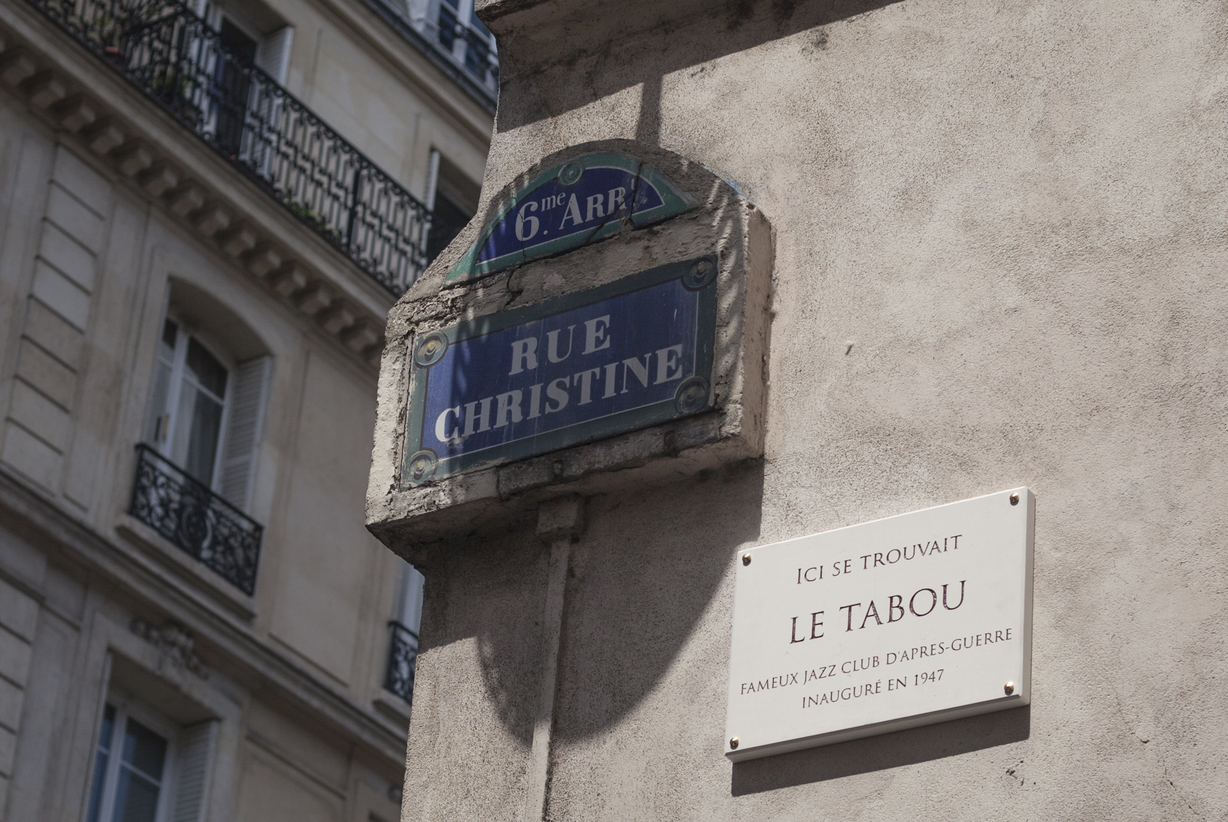 Posée à l'angle des rue Christine et Dauphine 75006 PARIS inaugurée le 19 juin 2015